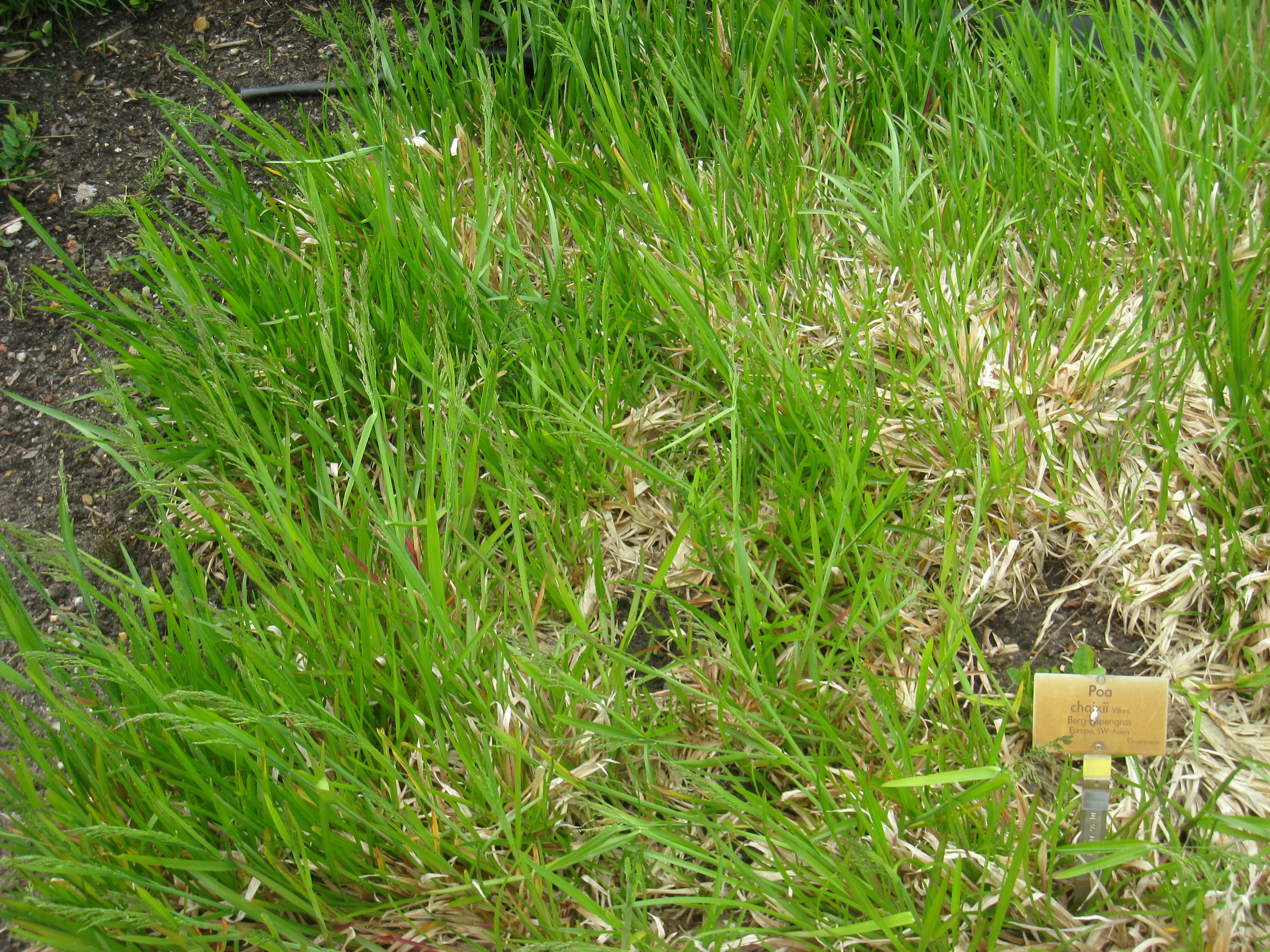 Poa chaixii specimen in the Botanischer Garten, Berlin-Dahlem (Berlin Botanical Garden), Berlin, Germany.